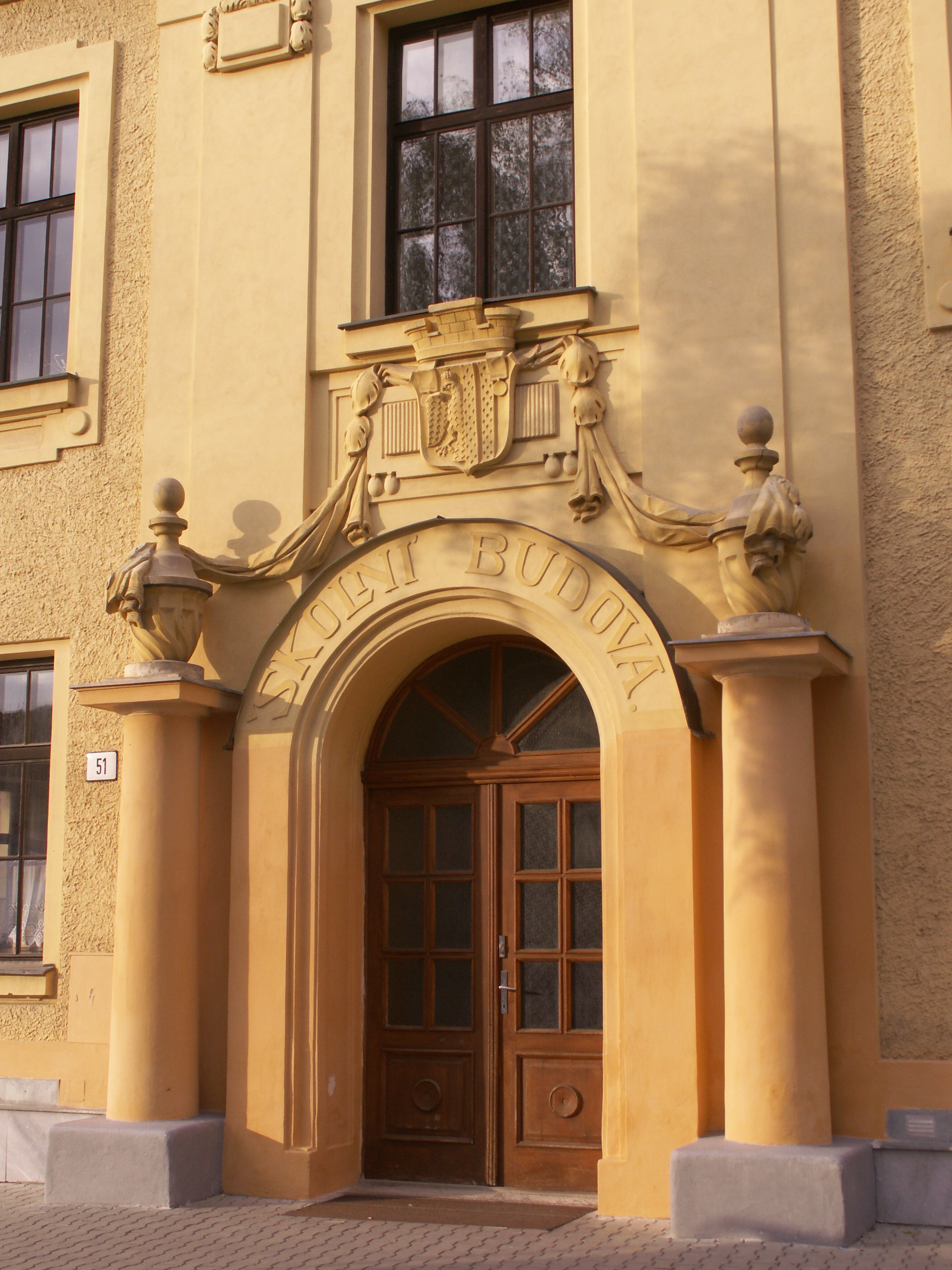 portál školní budovy, Veverská Bítýška, okres Brno-venkov